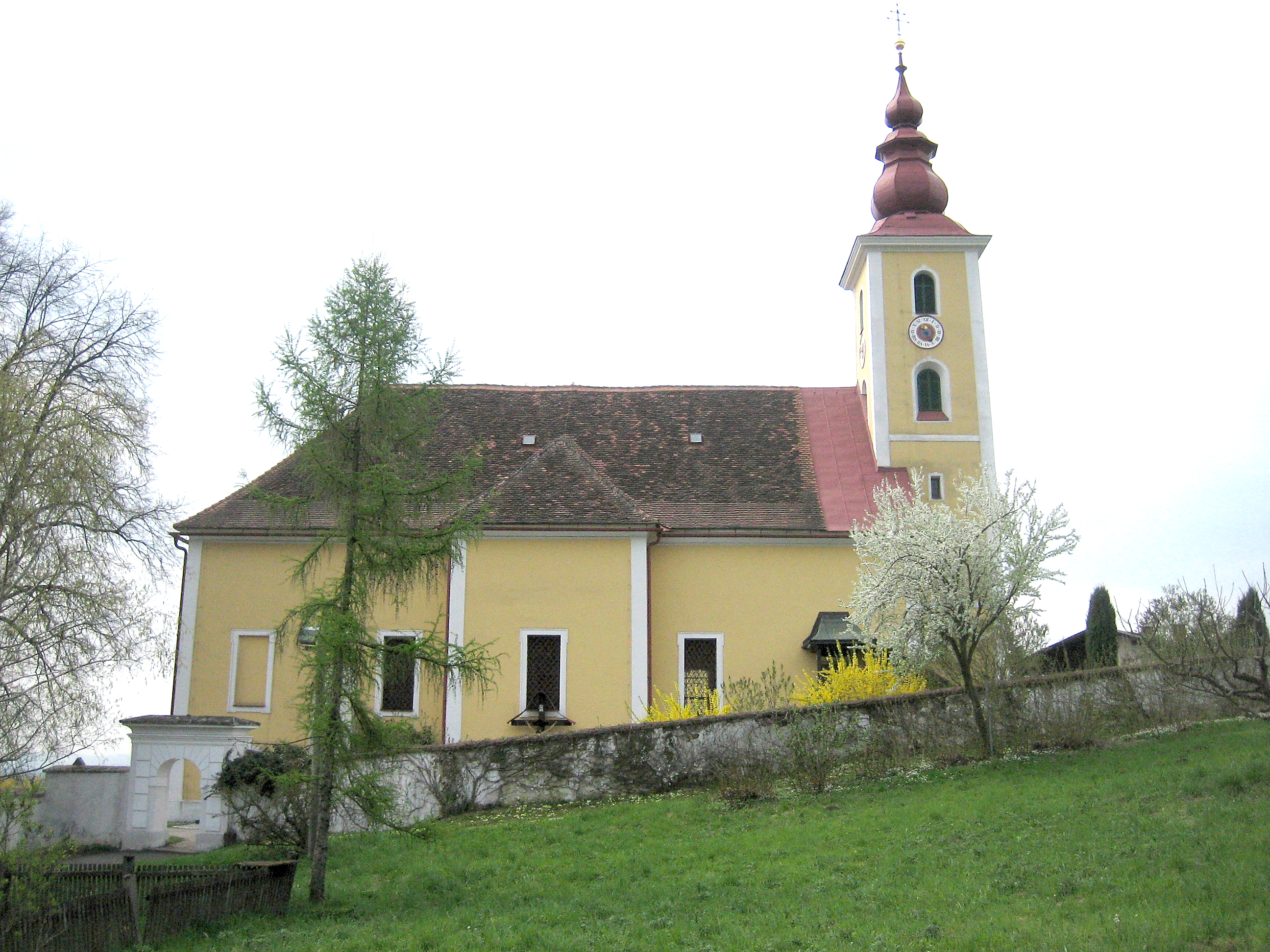 Kath. Pfarrkirche hl. Margaretha